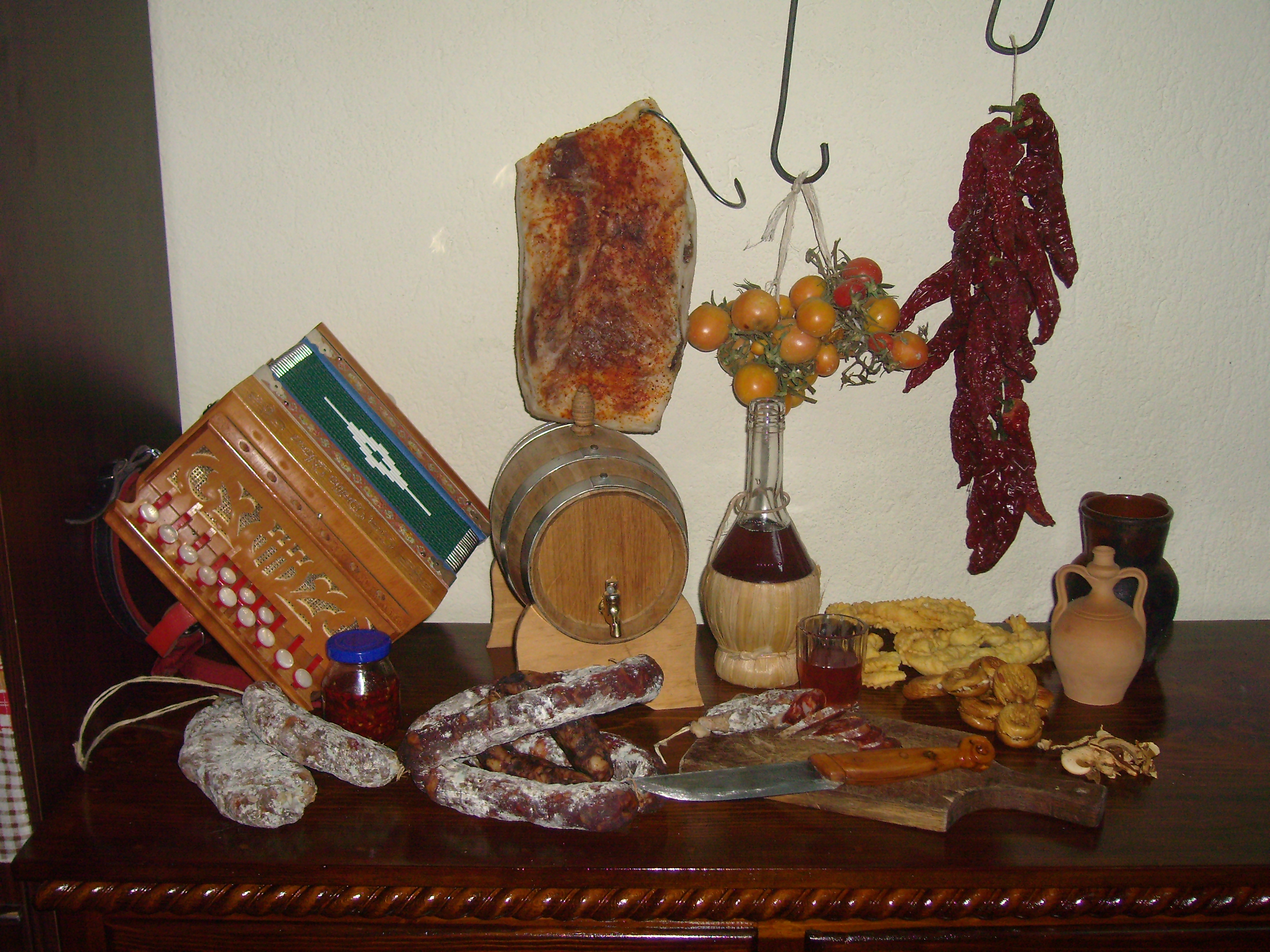 Prodotti tipici di Albidona